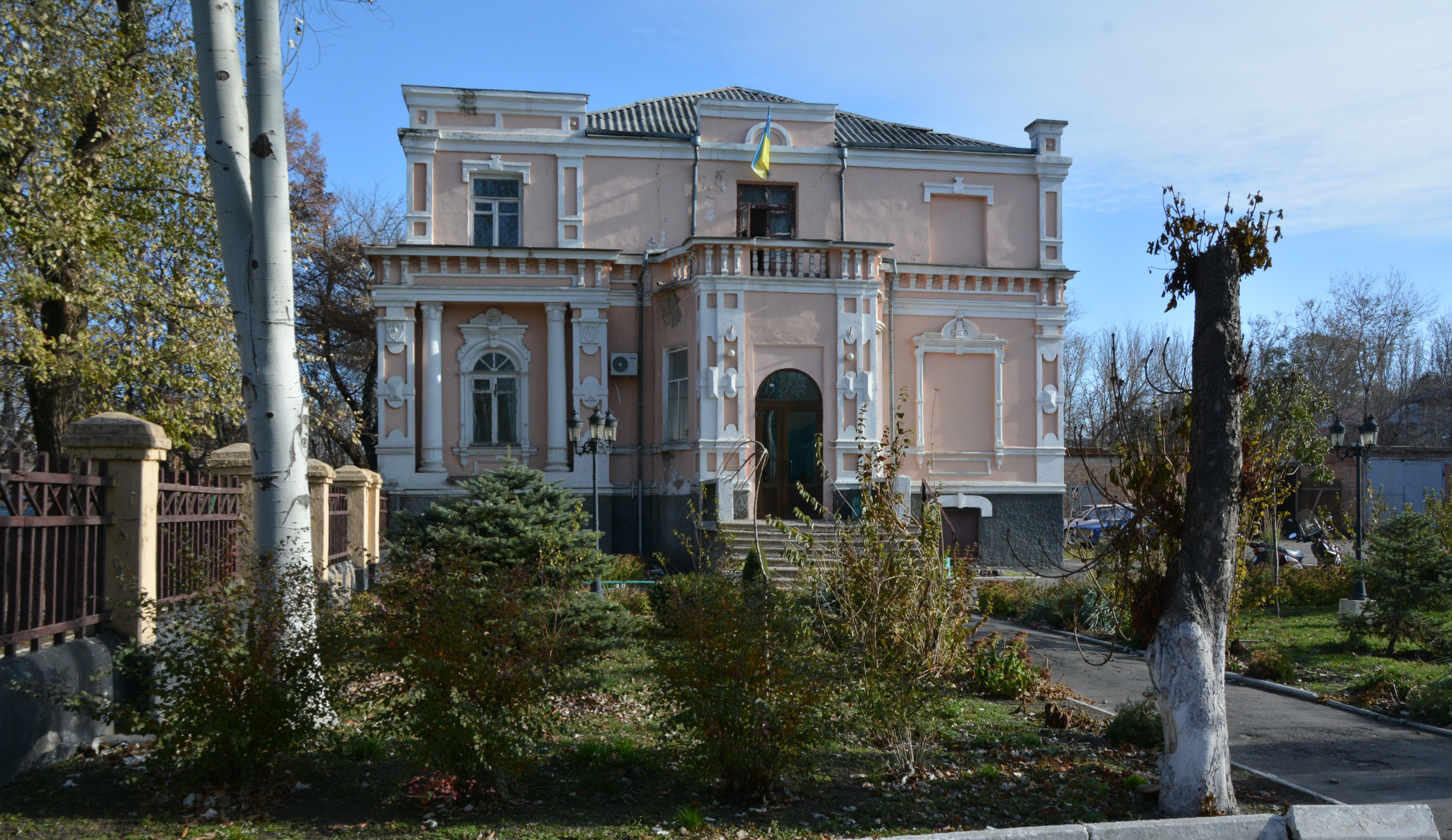 Садиба Генріха Янцена (Оріхівська міська рада), Оріхів, вул. Т. Шевченка, 11